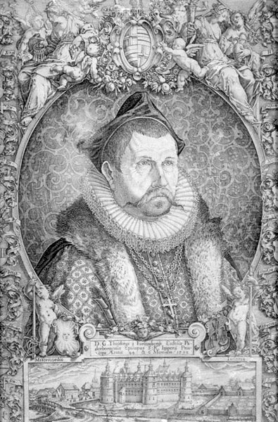 Fürstbischof Dietrich IV. von Fürstenberg